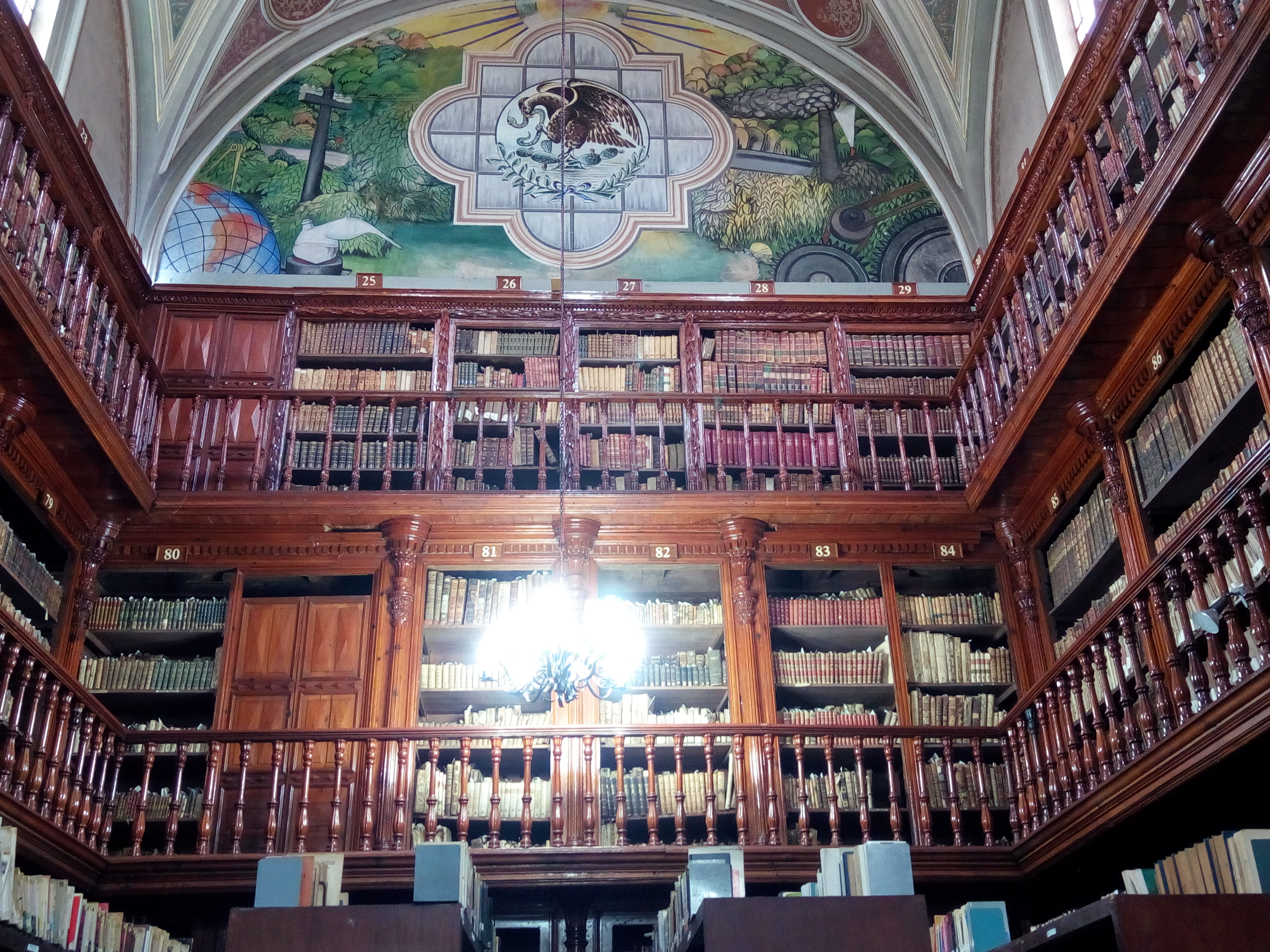 Biblioteca pública en Morelia, antiguo Templo de la Compañía de Jesús